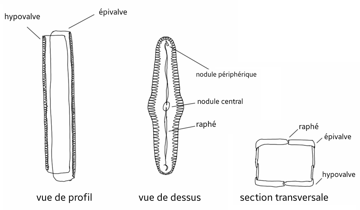 Schéma de la frustule de Pinnularia viridis